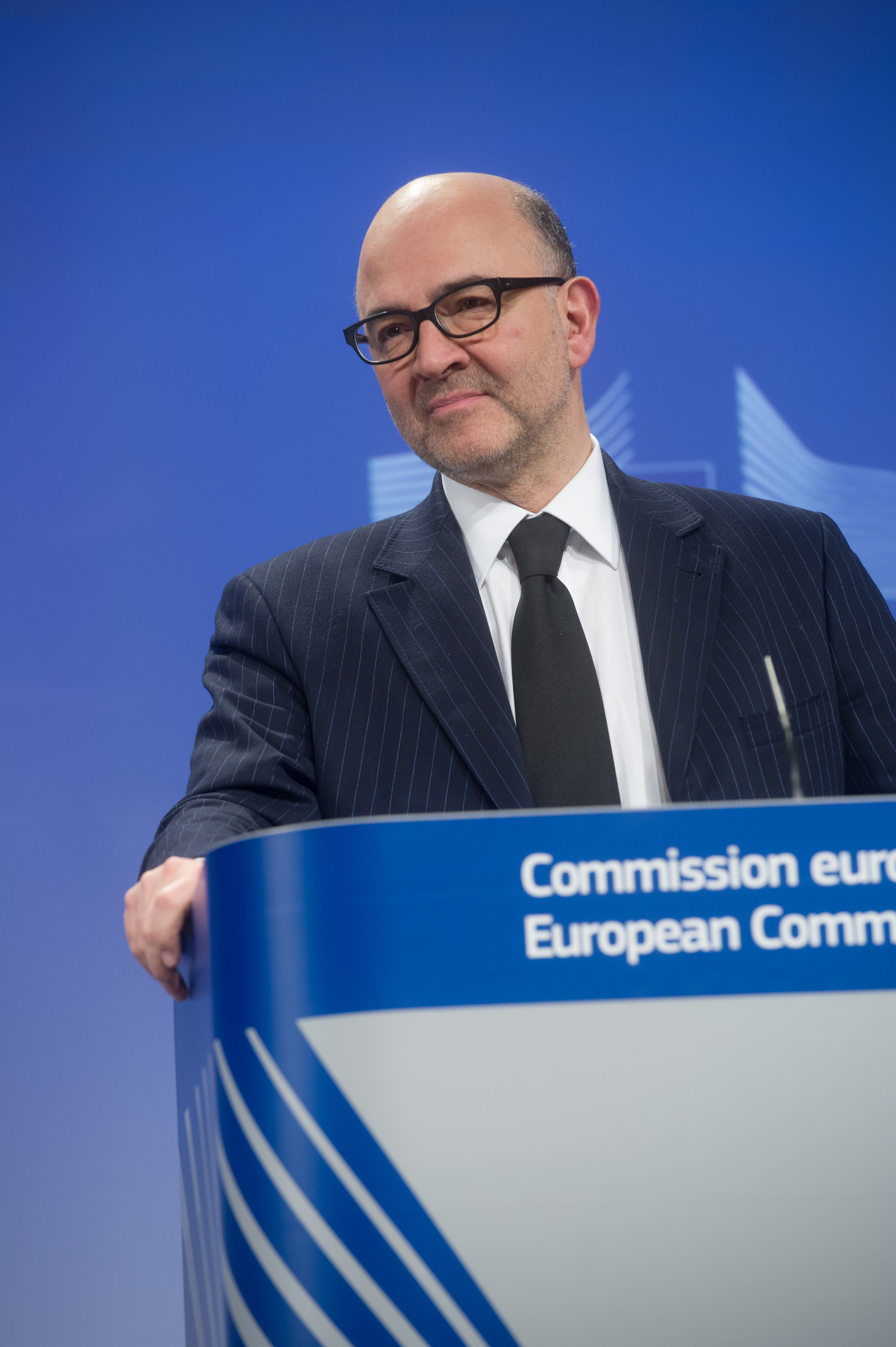 Pierre Moscovici en conférence de presse - 25 février 2015